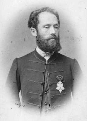 Vámbéry Ármin portréja. Schrecker Ignác felvétele